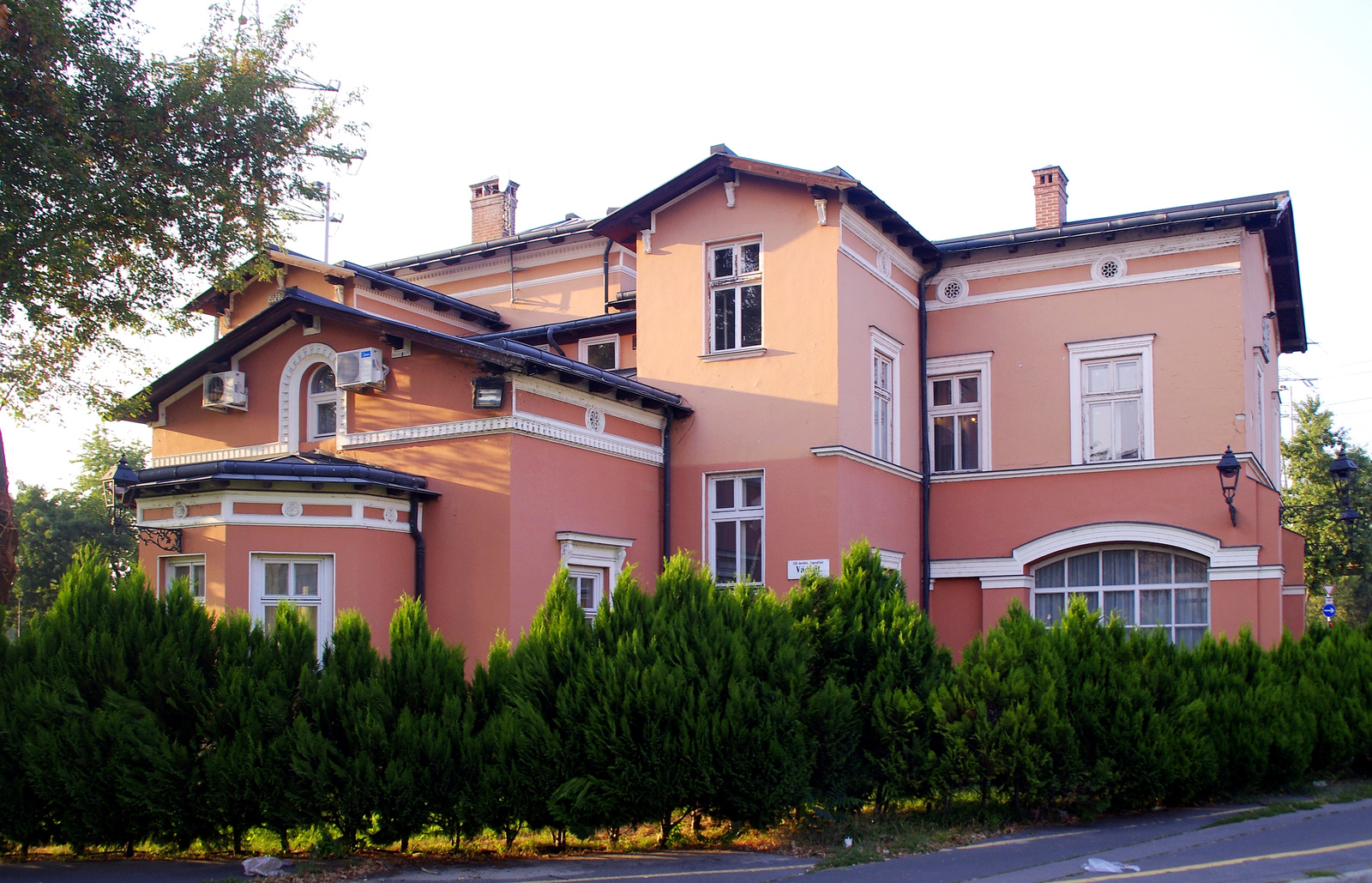 Lóvasút indóház (Budapest 13, Váci út 201.) This is a photo of a monument in Hungary. Identifier: 1193